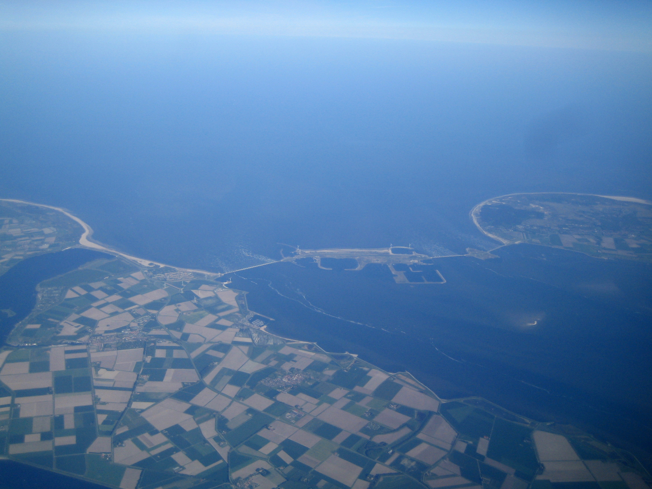 Luftaufnahme der Oosterschelde-Sturmflutwehr von Osten. Links: Noord-Beveland; rechts: Schouwen-Duiveland